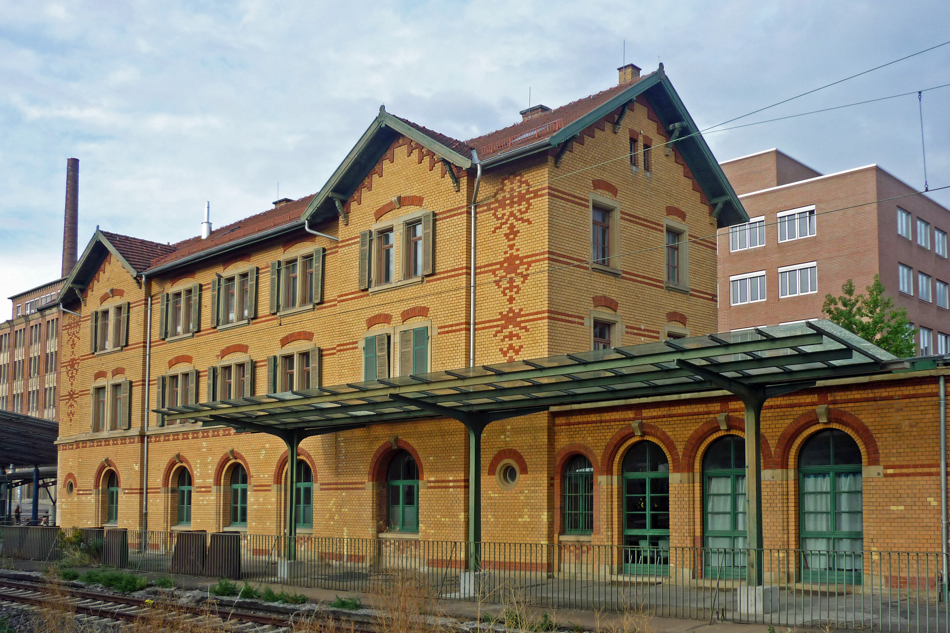 Alter Bahnhof in Kornwestheim